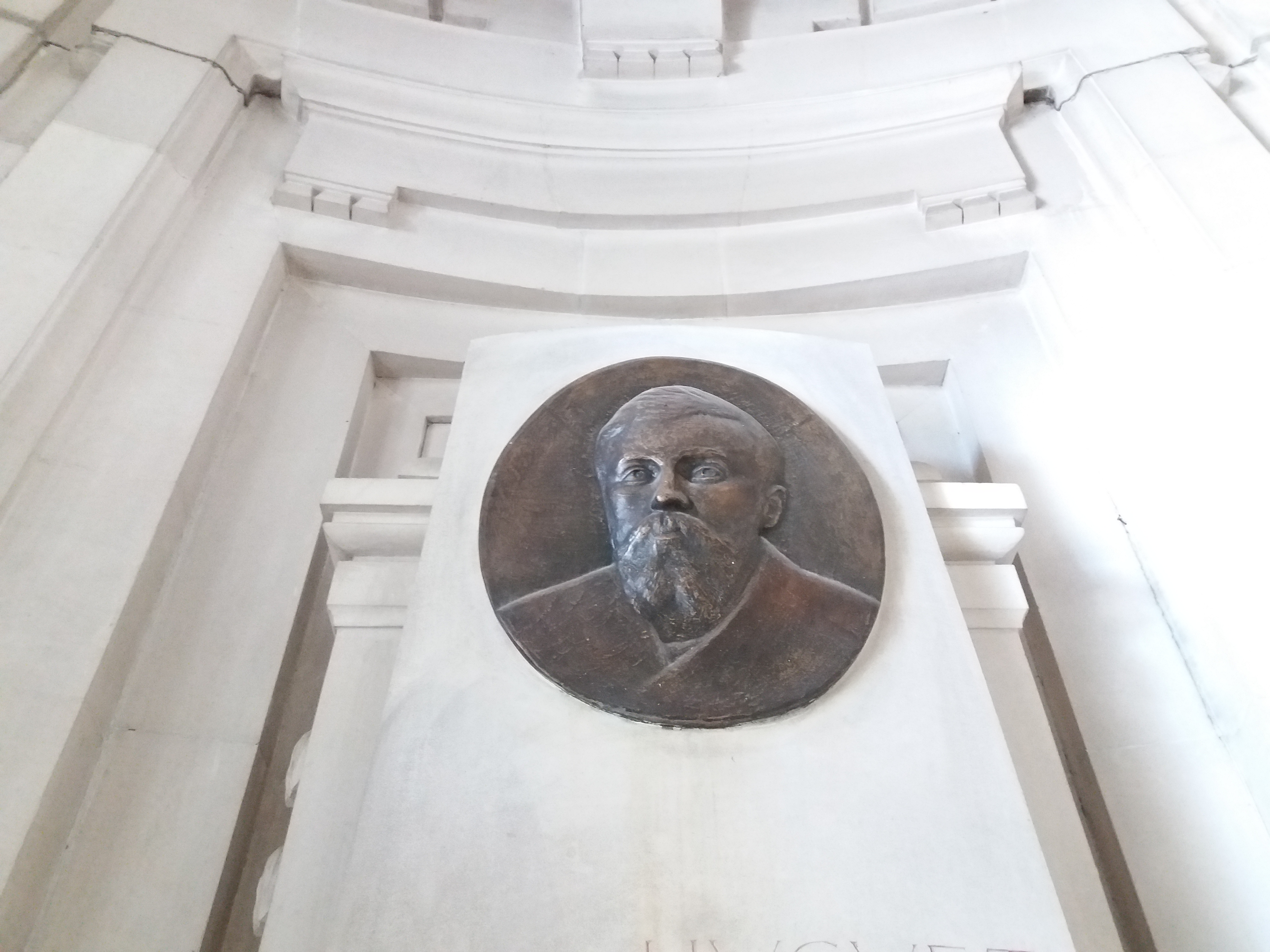 Portrait d'Eugène Huguet.